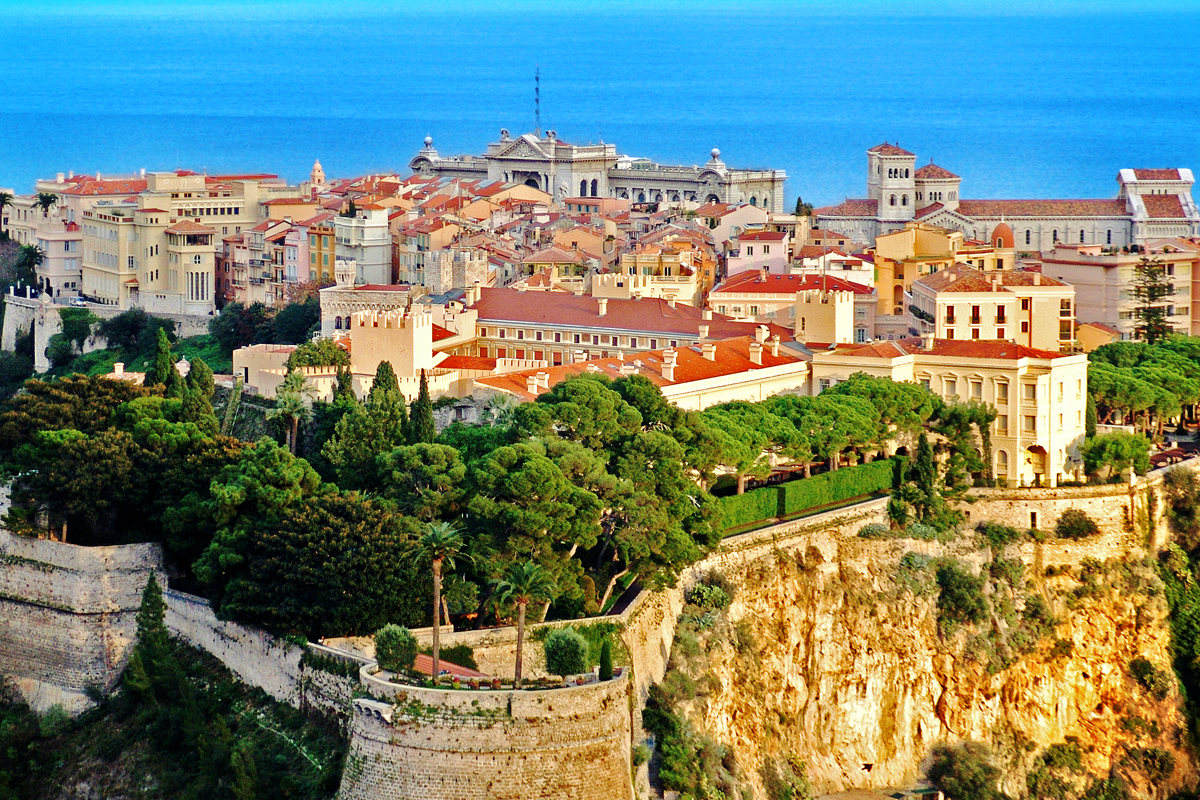 Der monegassische Fürstenhof